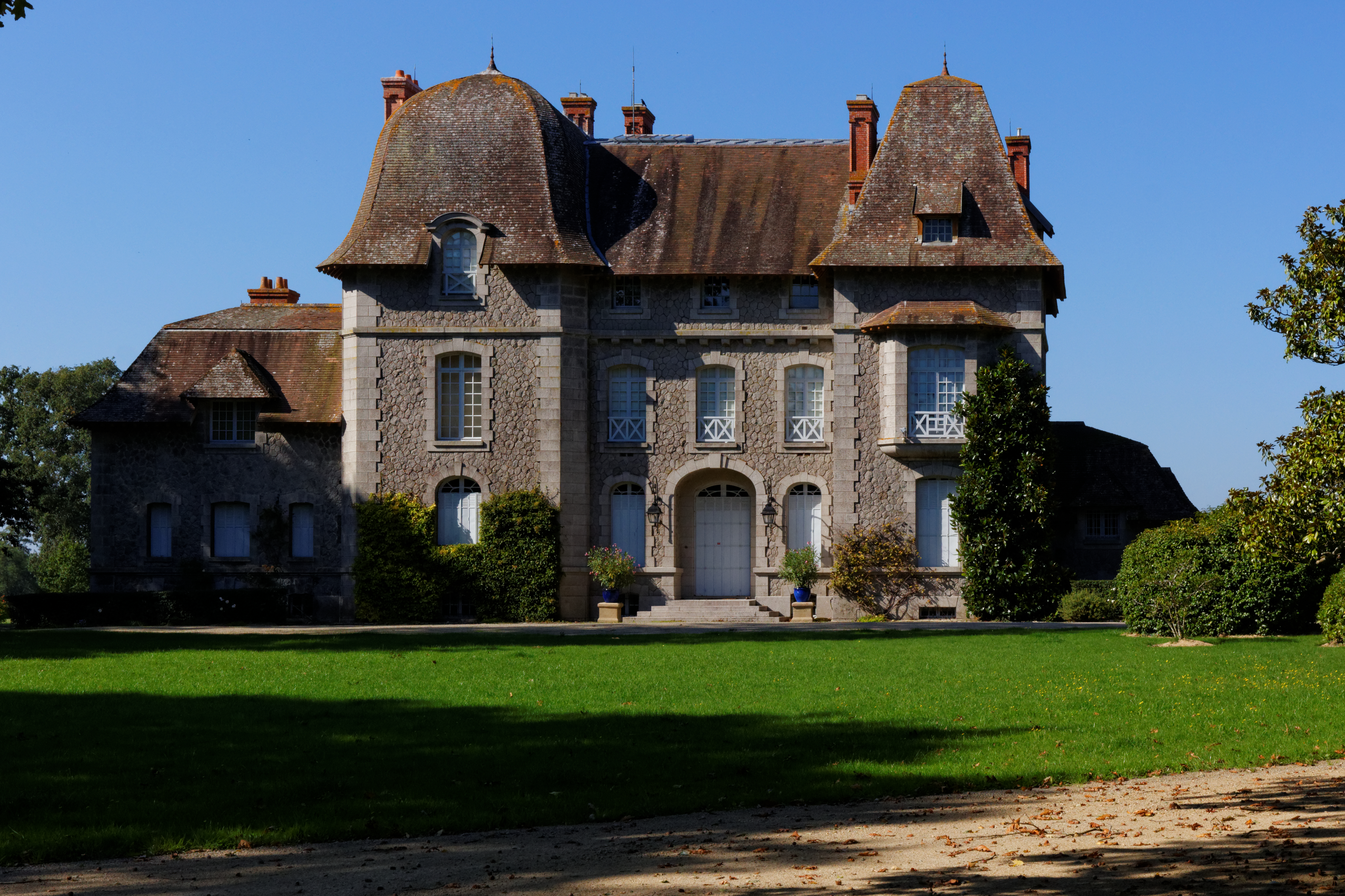 Château de Bois-Rouaud, lors de l'OPL Chéméré